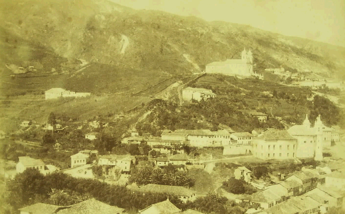 Vista panorâmica da cidade de Ouro Preto, Minas Gerais, Brasil